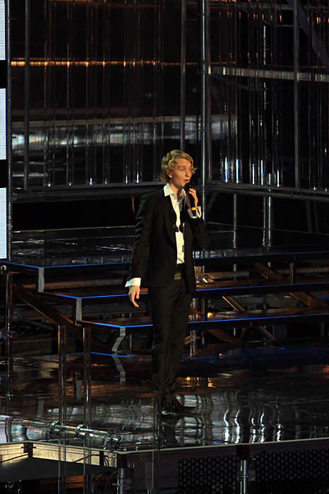 Komikern Björn Gustavsson på generalrepet för Melodifestivalen i Globen 2008